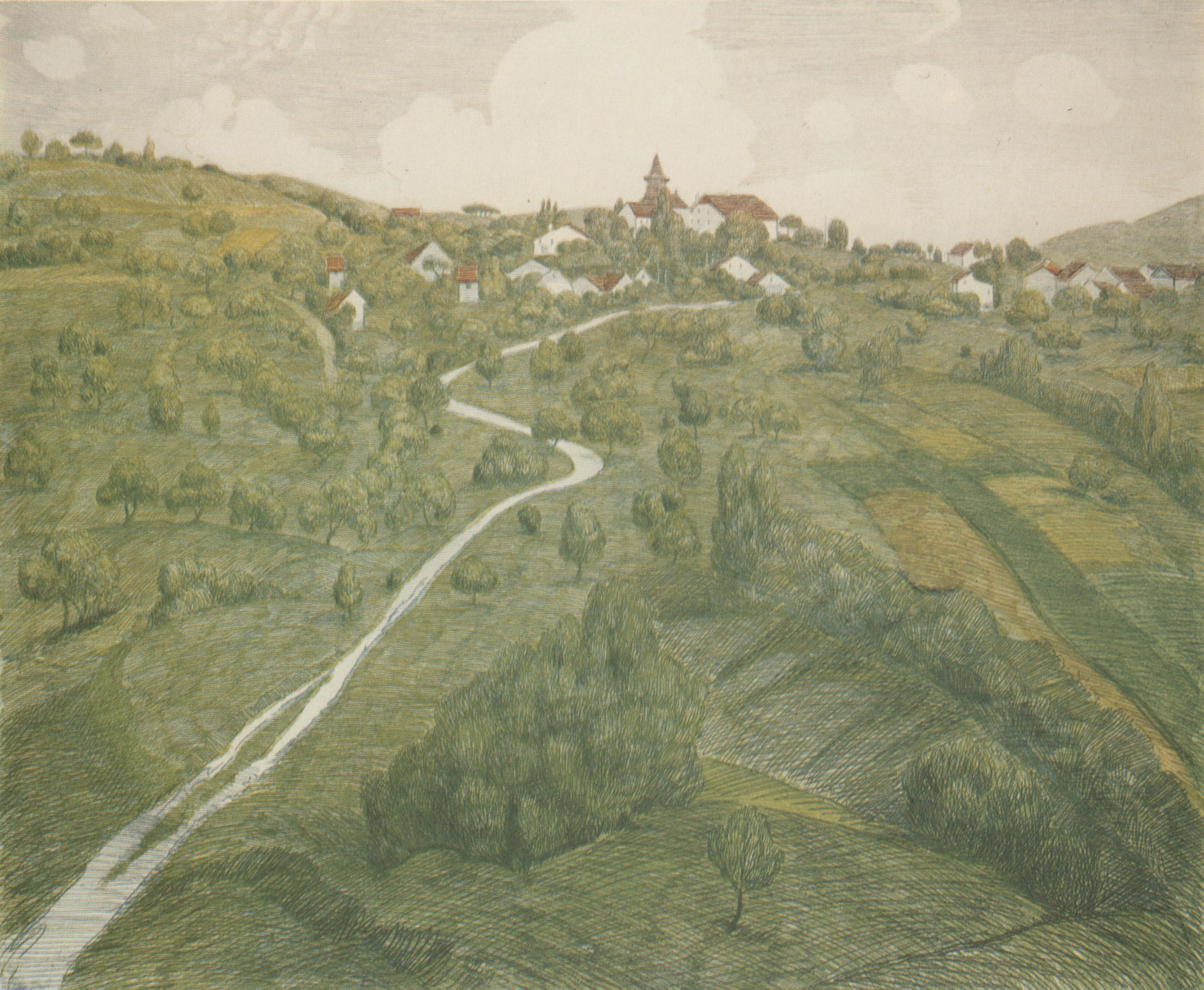 Zeitgenössisches Gemälde: Belmont sur Lausanne